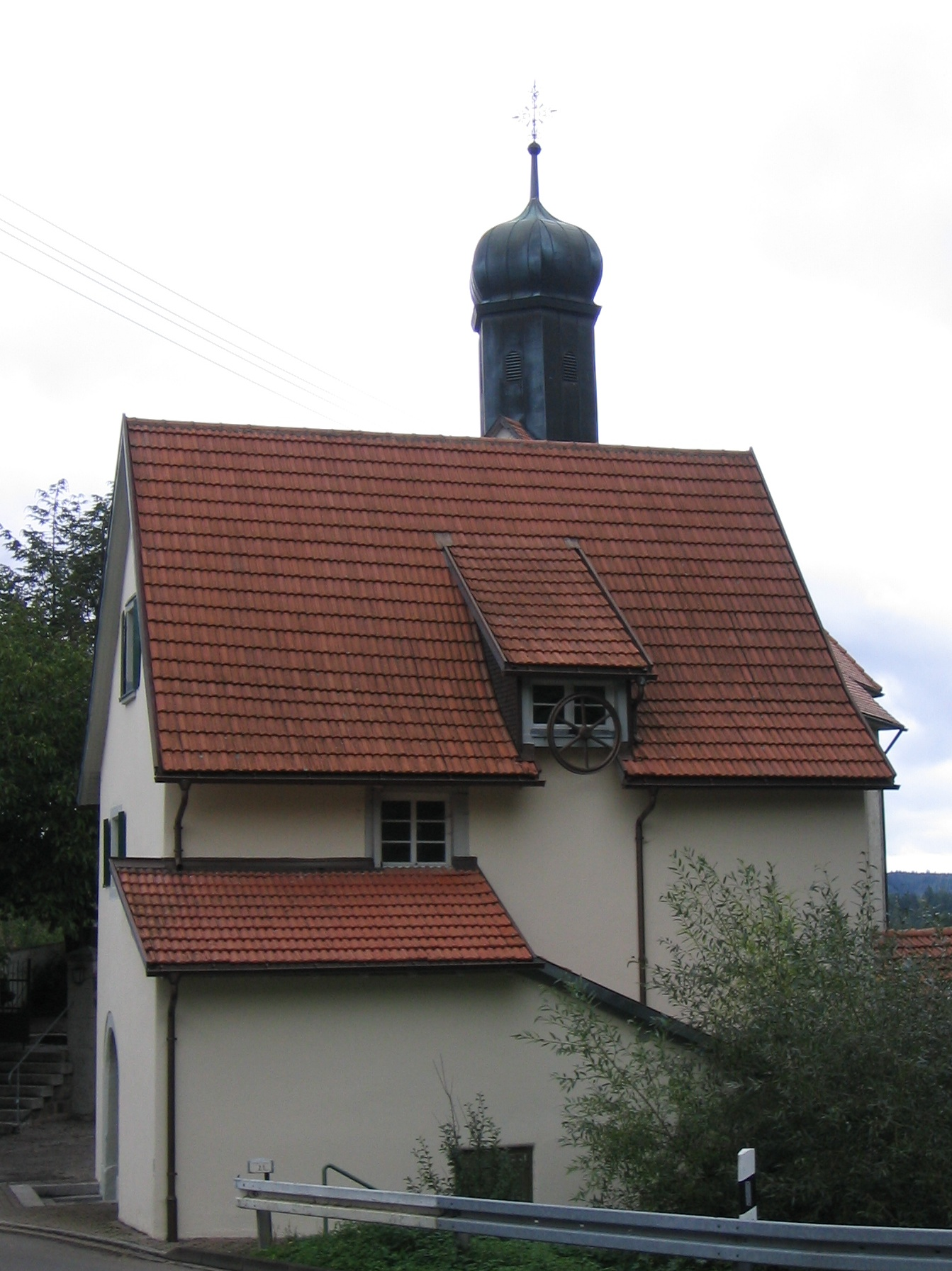 Das Museum "Boller Mühle" in Boll, einem Ortsteil von Bonndorf im Schwarzwald